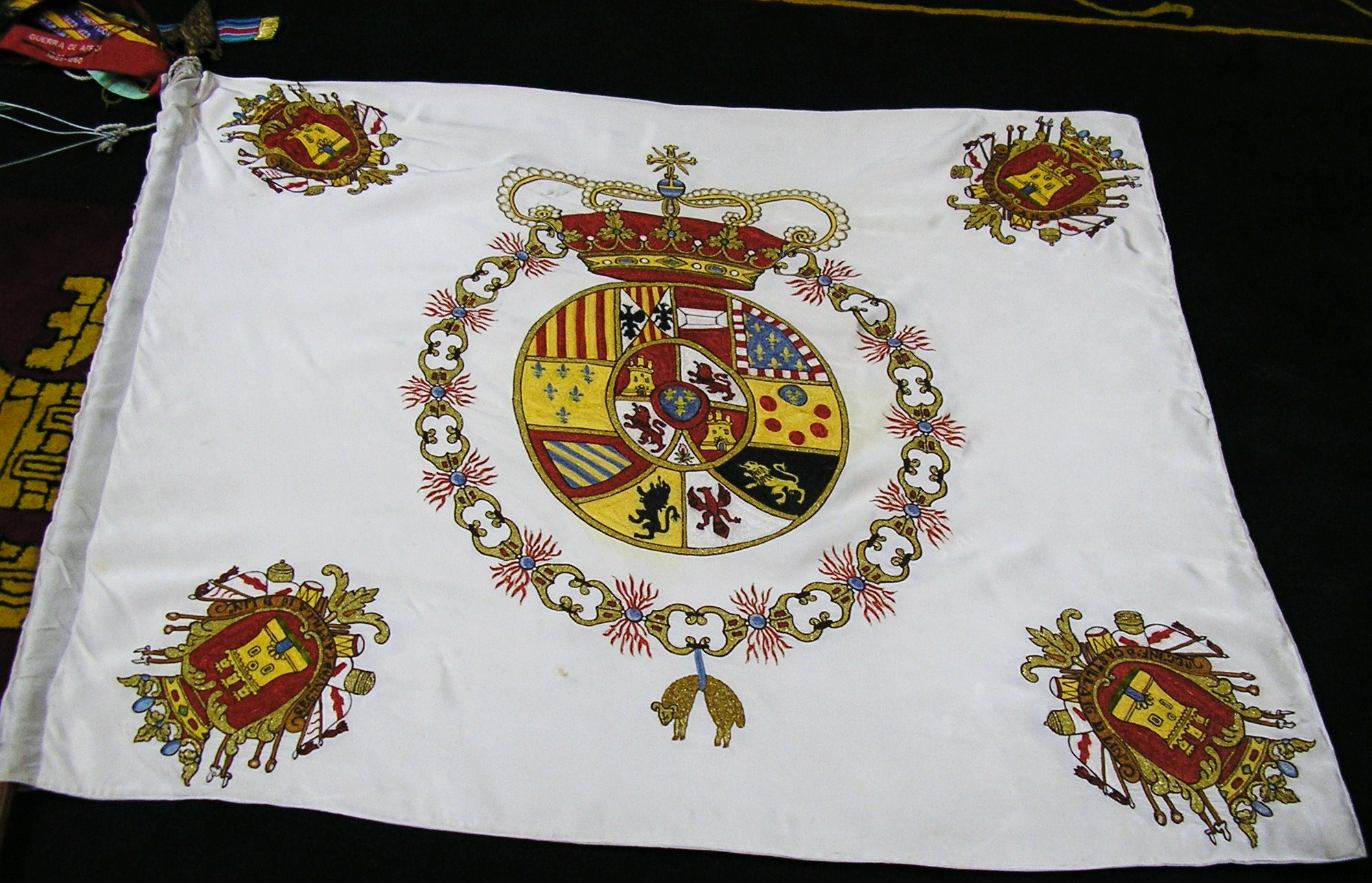 Bandera coronela del Regimiento de Infantería Castilla nº 16